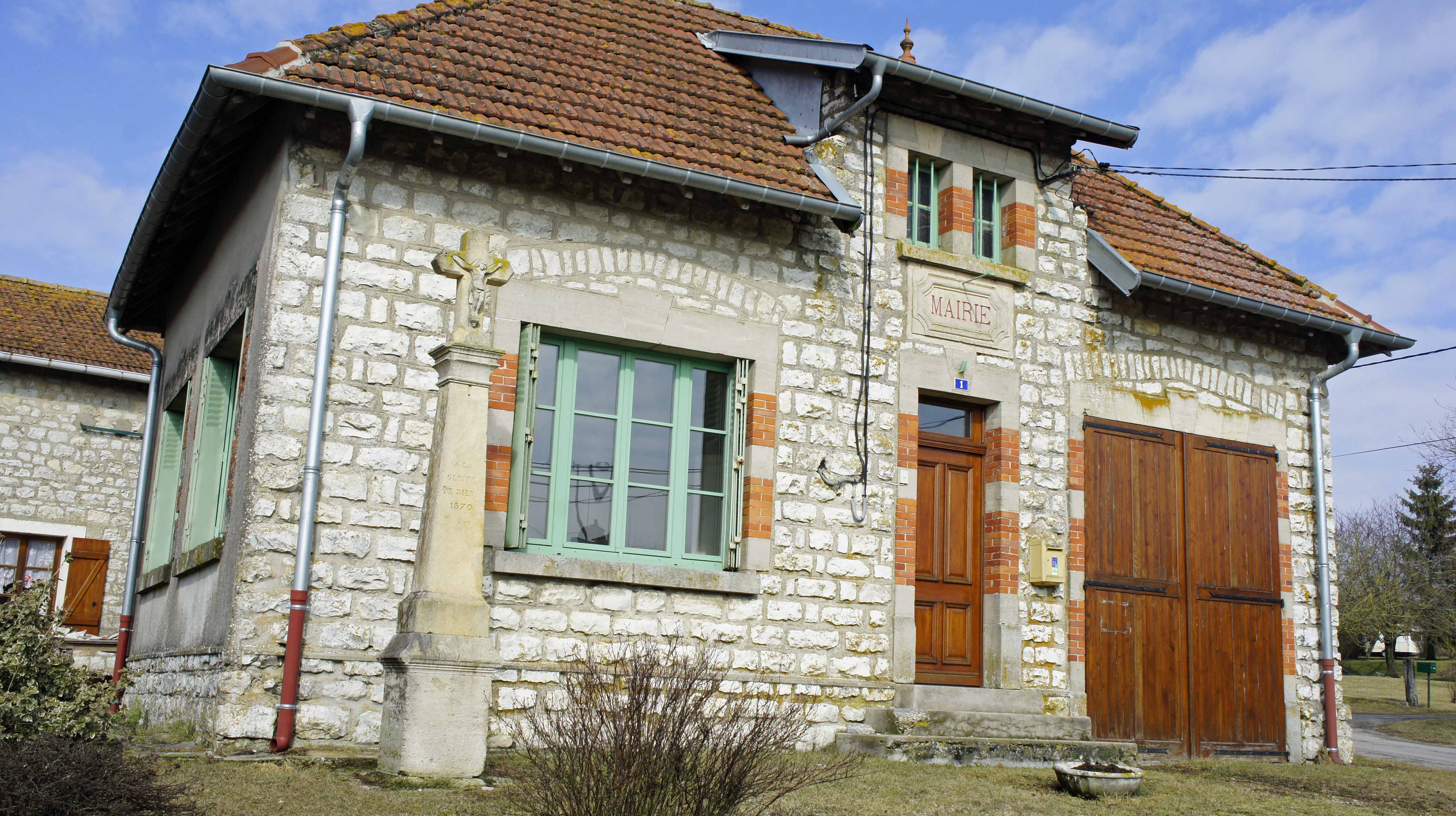 Sur la commune de Beausite, la mairie et une croix (1870) d'Amblaincourt.